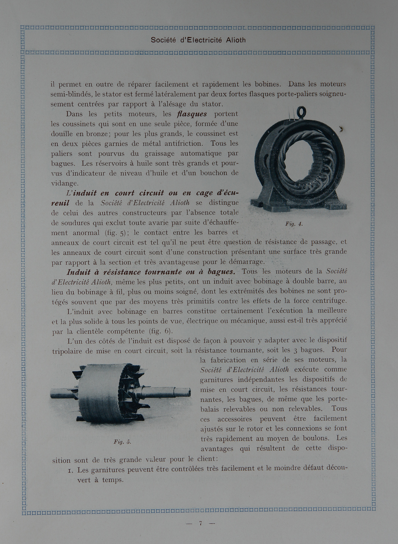 Extrait d'un catologue de la Société d'électricité Alioth datant vers 1910. L'on voit très bien la cage d'écureuil du rotor et les bobinages imbriqués du stator. Ce changement d'équipements date chez Alioth aux environs de 1900 et est (pour le rotor) inspiré des bobinages en tambour.. Il est intéressant de les opposer aux anciennes séries. Paradoxalement c'est ce bobinage ci qui est resté dans le terme de métier comme 'bobinage Alioth', parce que c'était tout simplement le dernier connu.